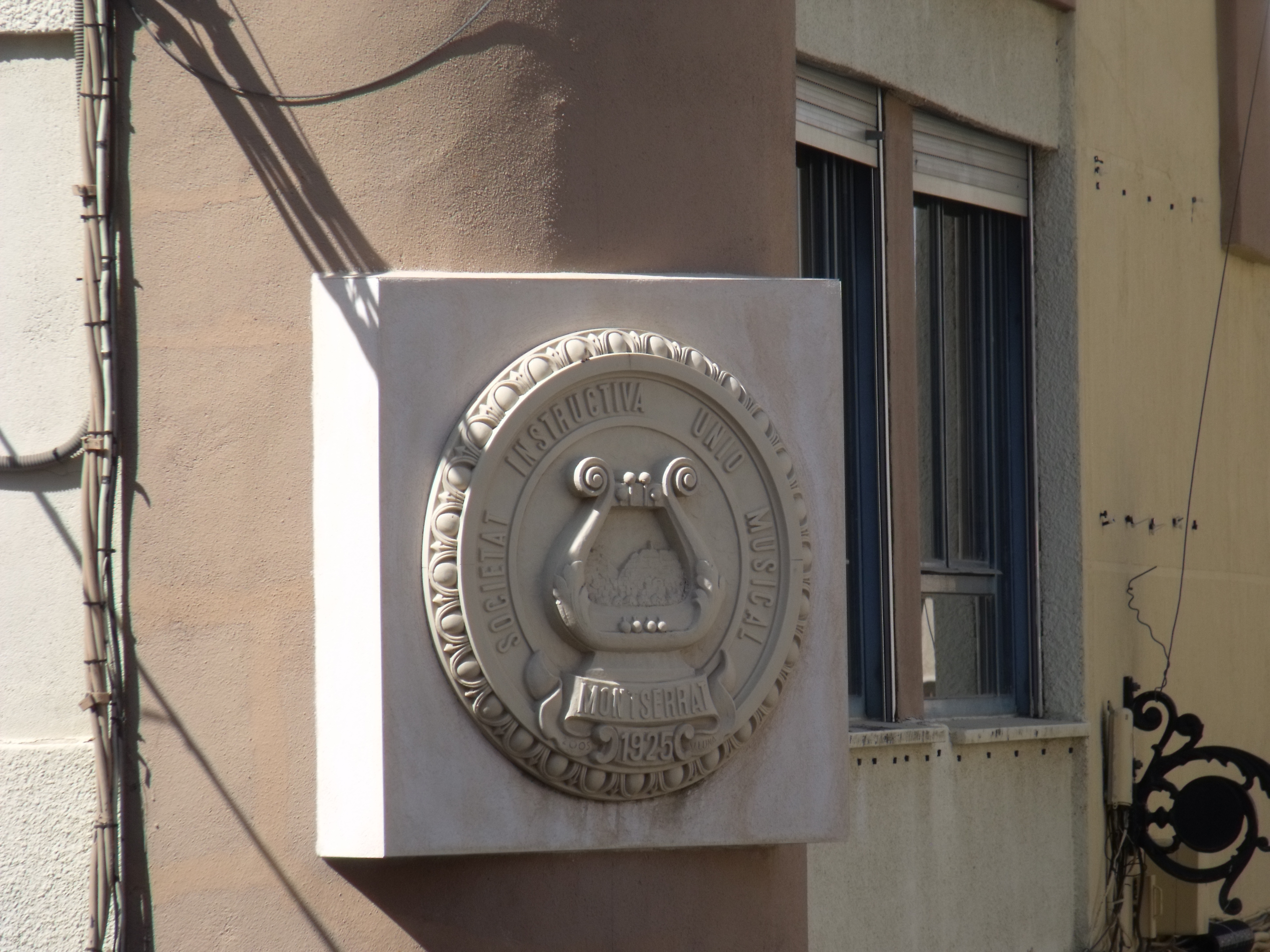 Montserrat, escut en la façana de l'edifici de la Societat Instructiva Unió Musical